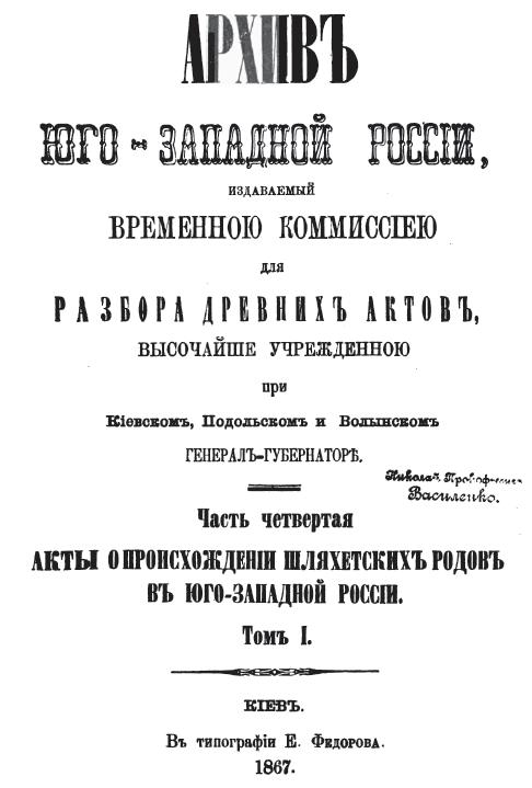 Титульная страница книги Архив Юго-Западной России. Часть 4. Том 1. Акты о происхождении шляхетских родов в Юго-Зап. России. Киев, 1867 г.